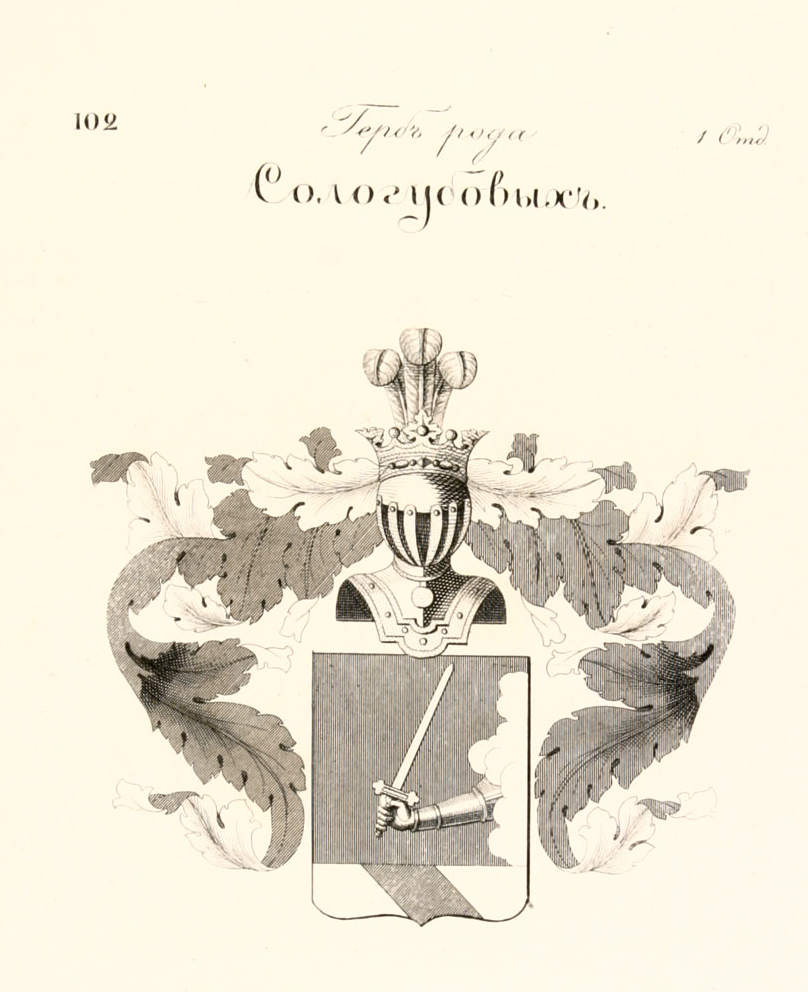 Герб рода дворян Сологубовых, внесен в часть X «Общего гербовника дворянских родов Российской империи»